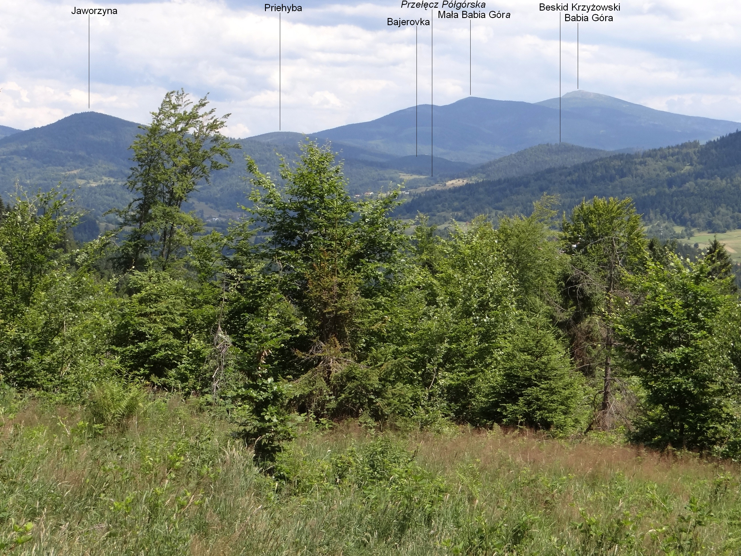 Widok z Przełęczy Przysłopy w Korbielowie